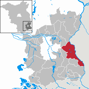 Forst (Lausitz) in Brandenburg (Country) - District Spree-Neiße